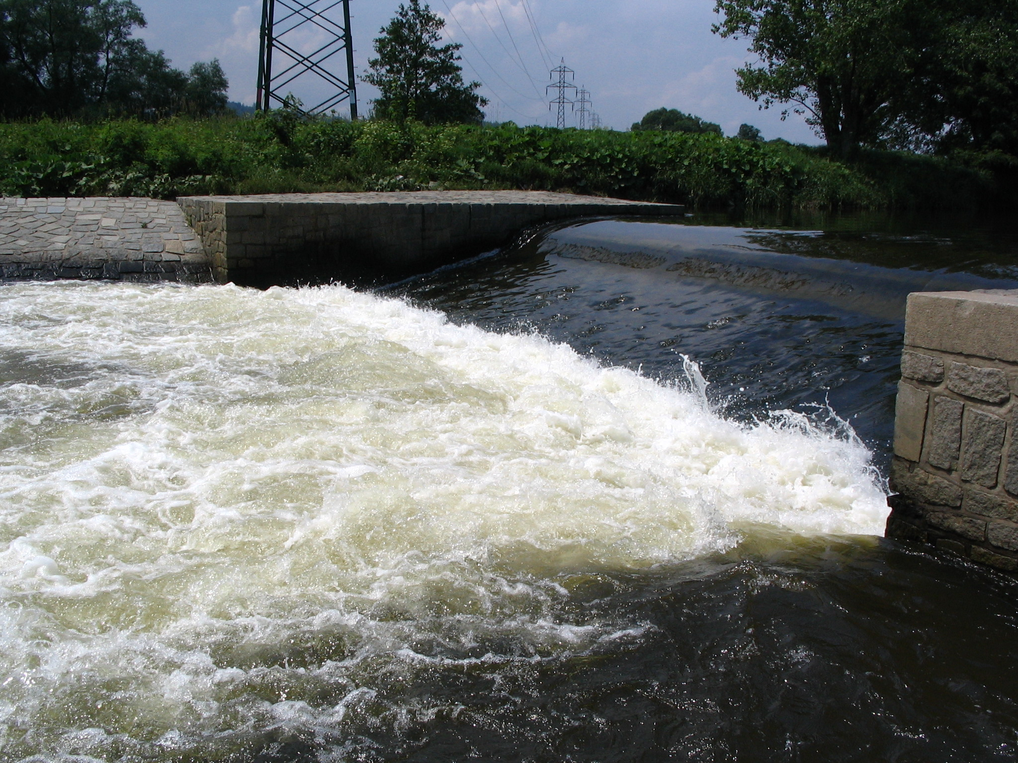 Válec pod jezem (Otava pod Horažďovicemi)